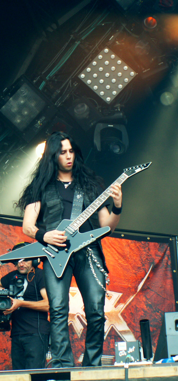 Gus G. sur scène au Hellfest 2011